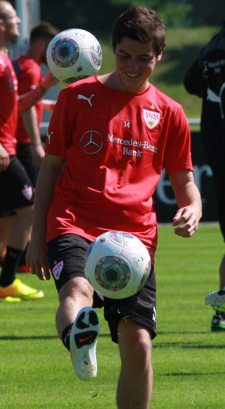 Marco Rojas beim VfB-Training. Aufgenommen von